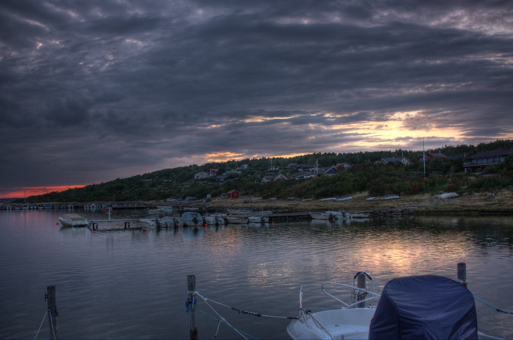 Tångaberg, Varbergs kommun.